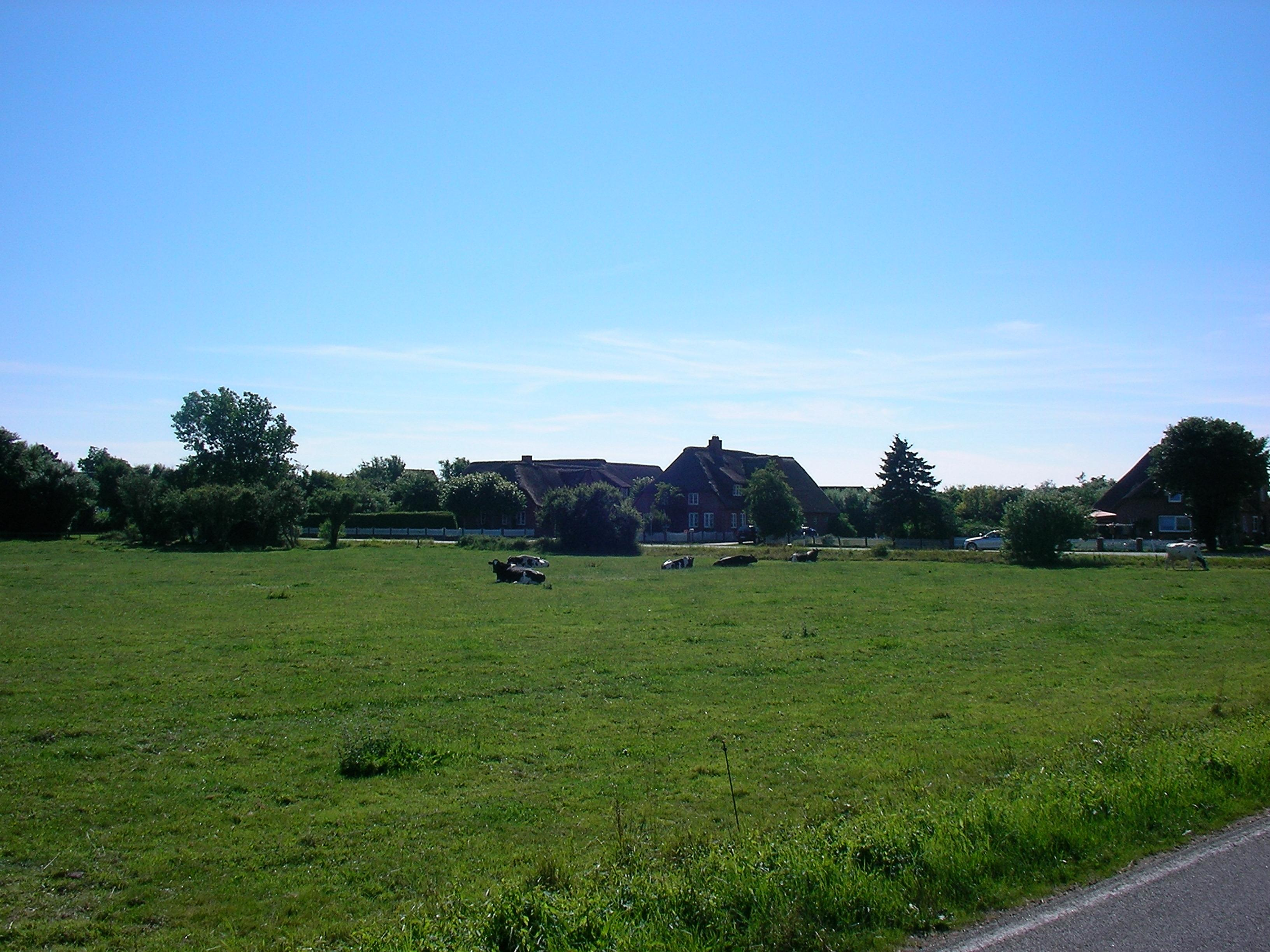 Dunsum